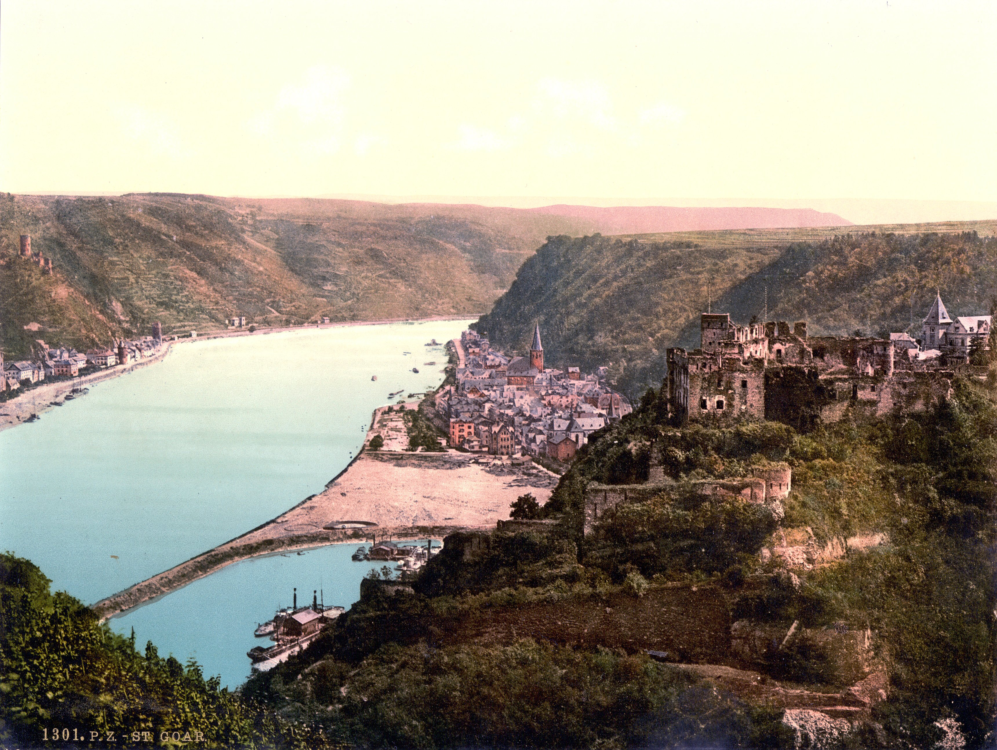 St. Goar